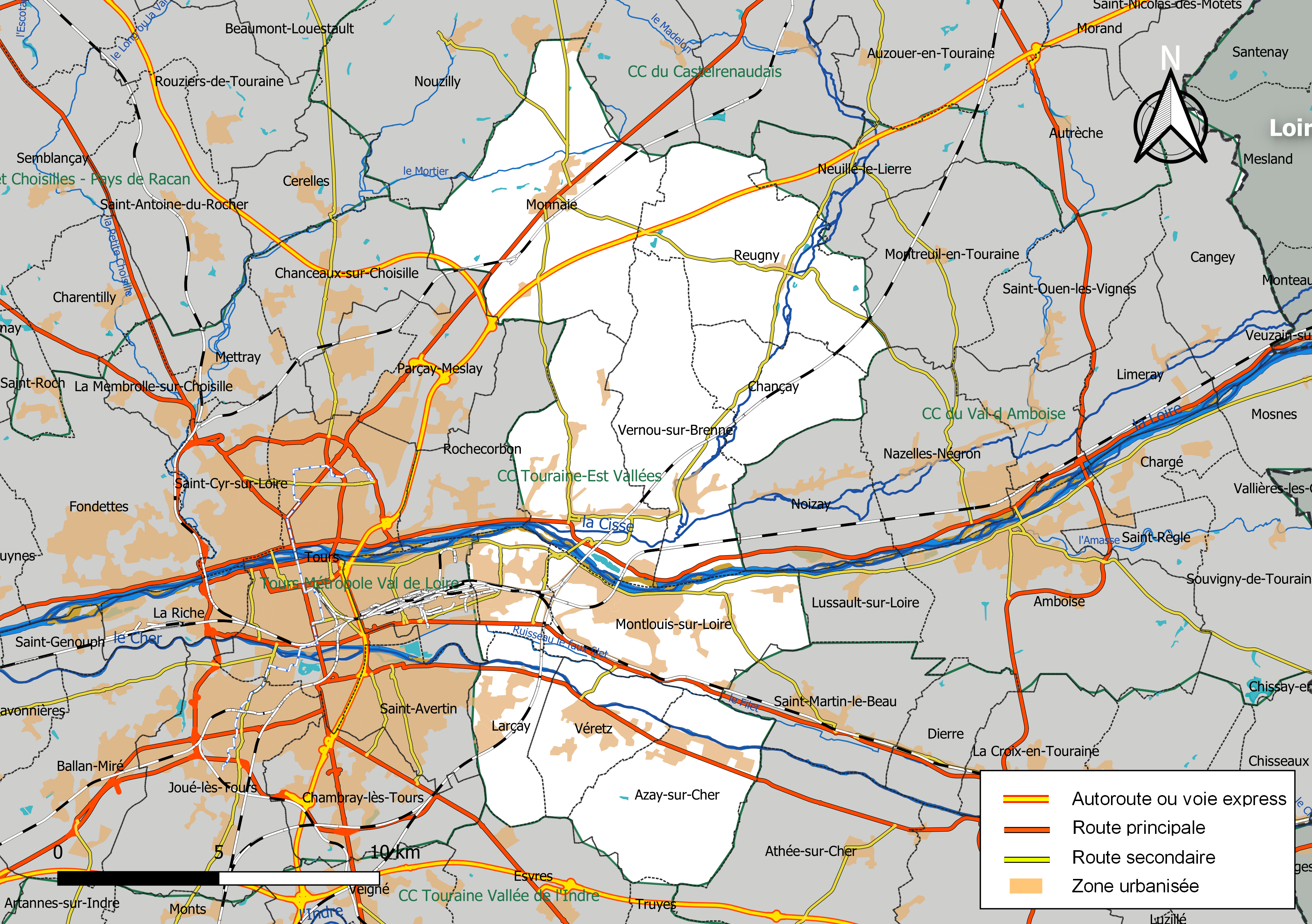 Carte de la communauté de communes Touraine-Est Vallées, département d'Indre-et-Loire, France. Composition au 1er janvier 2019.